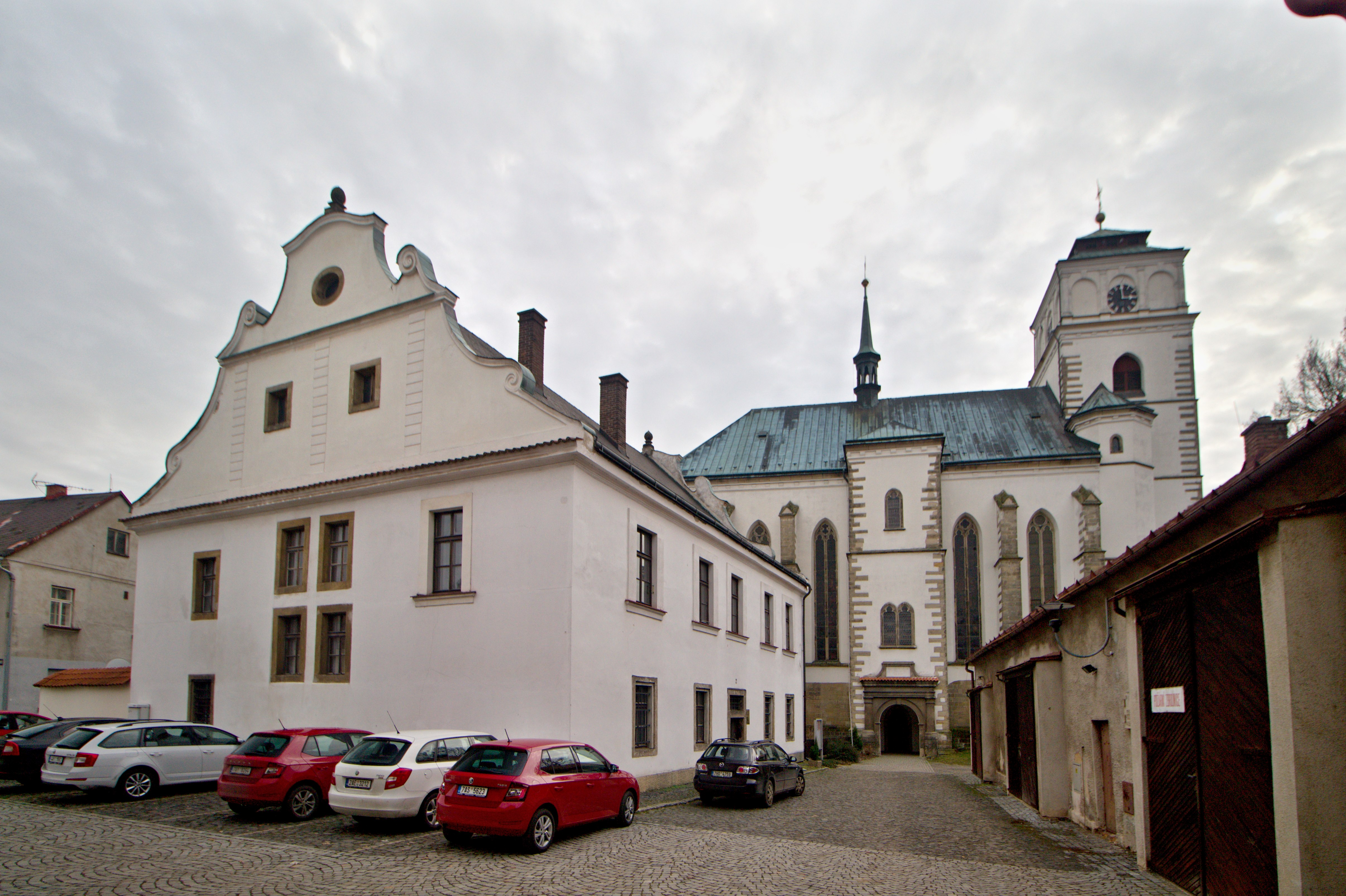 Sobotka